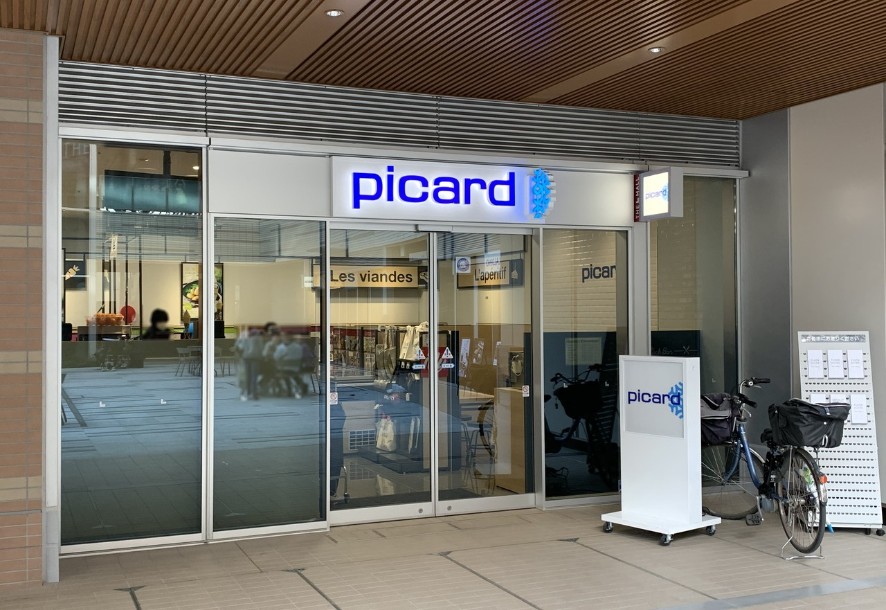 Picard武蔵小山店（東京都品川区）